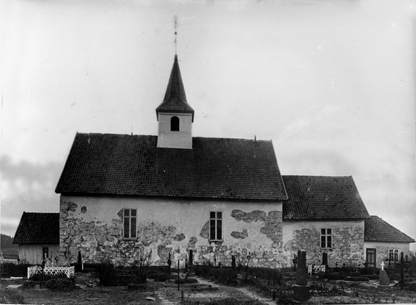 Ramnes kirke